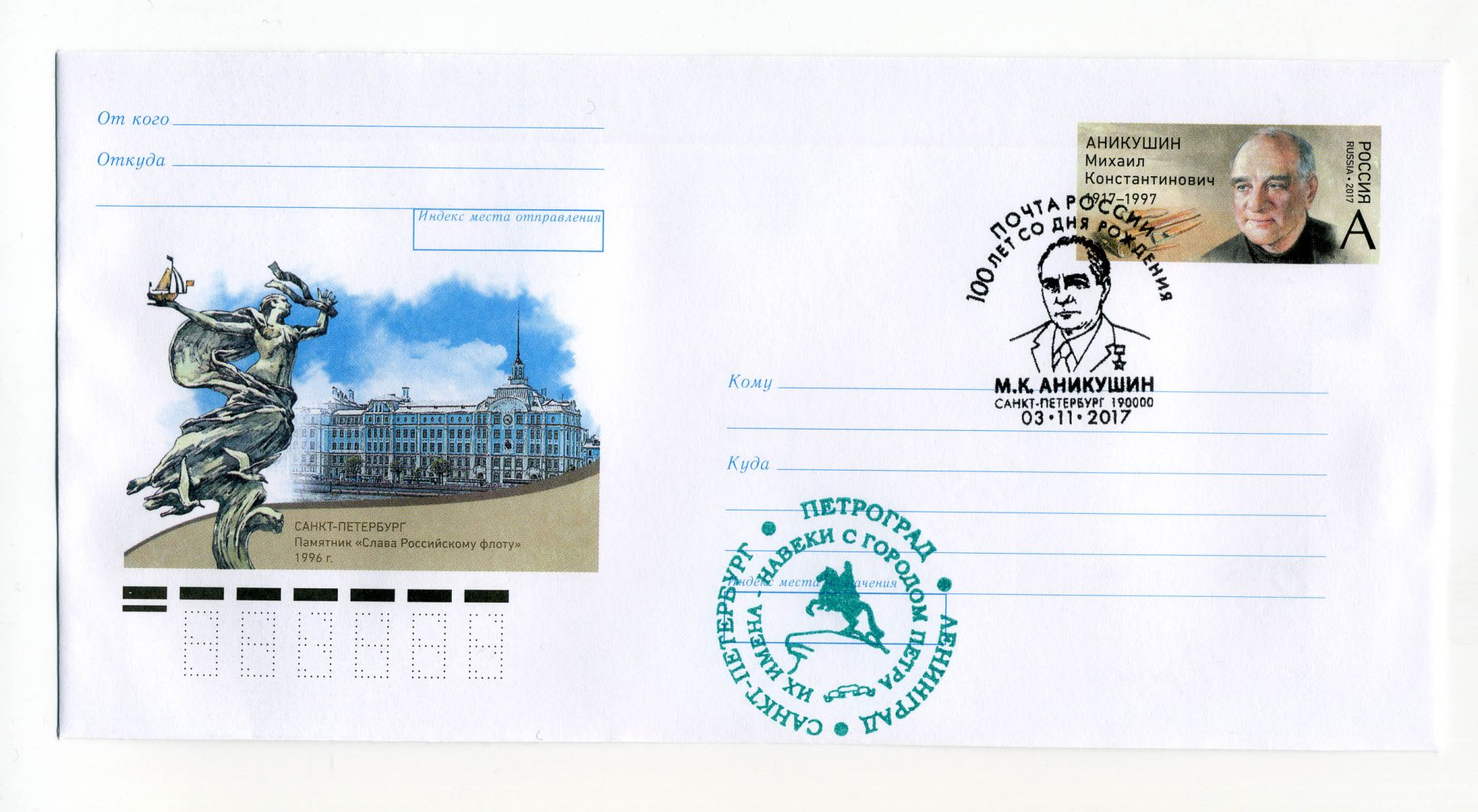 Аникушин Михаил Константинович, почтовый конверт